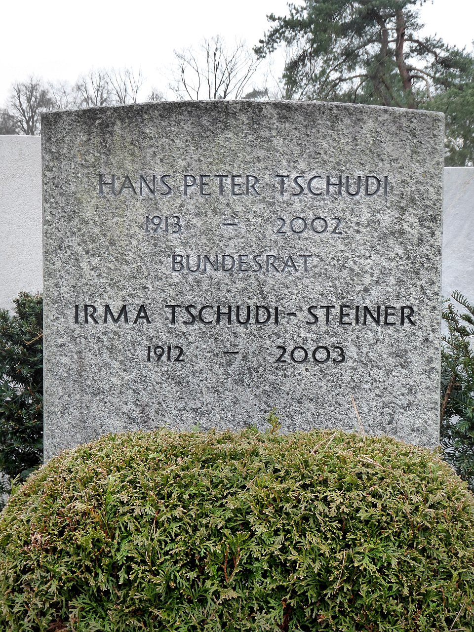 Irma Tschudi-Steiner (1912–2003) Dr. phil. nat., Pharmazeutin, Basels erste Privatdozentin an der Phil. nat. Fakultät, ao. Prof. für pharmazeut. Spezialgebiete an der Uni Bern, Grab auf dem Friedhof Hörnli, Riehen, Basel-Stadt